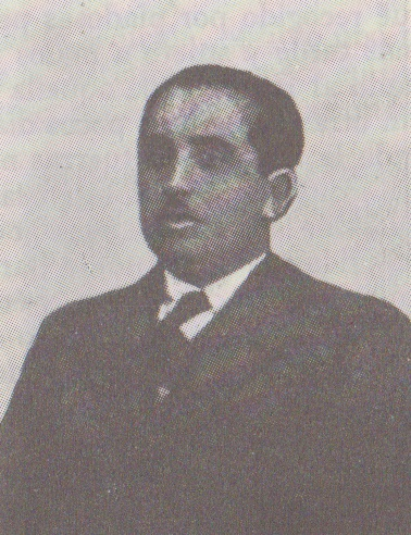 Escritor y político tradicionalista